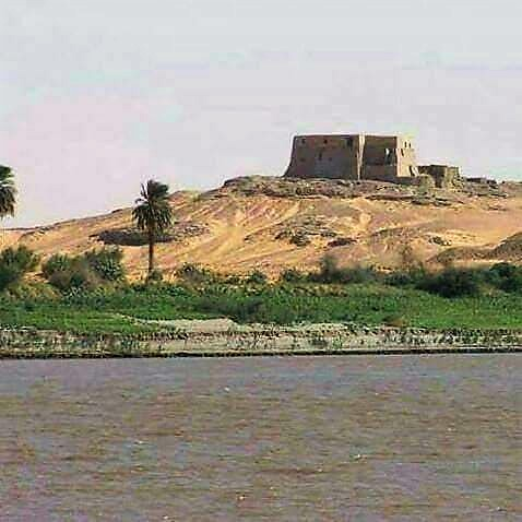 صورة لمسجد عبدالله بن أبي السرح بمنطقة دنقلا العجوز